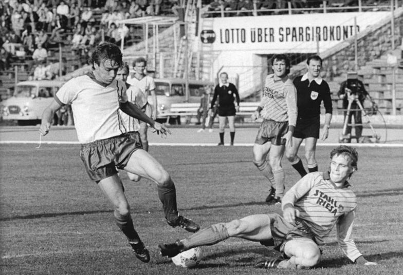 ADN-ZB-Grimm-3.10.87-A-Berlin: Fußball-Oberliga- BFC Dynamo - Stahl Riesa 3:0- Thomas Doll (l., BFC) beim Angriff auf das Gästetor; r. Sven Kretzschmar (Riesa).